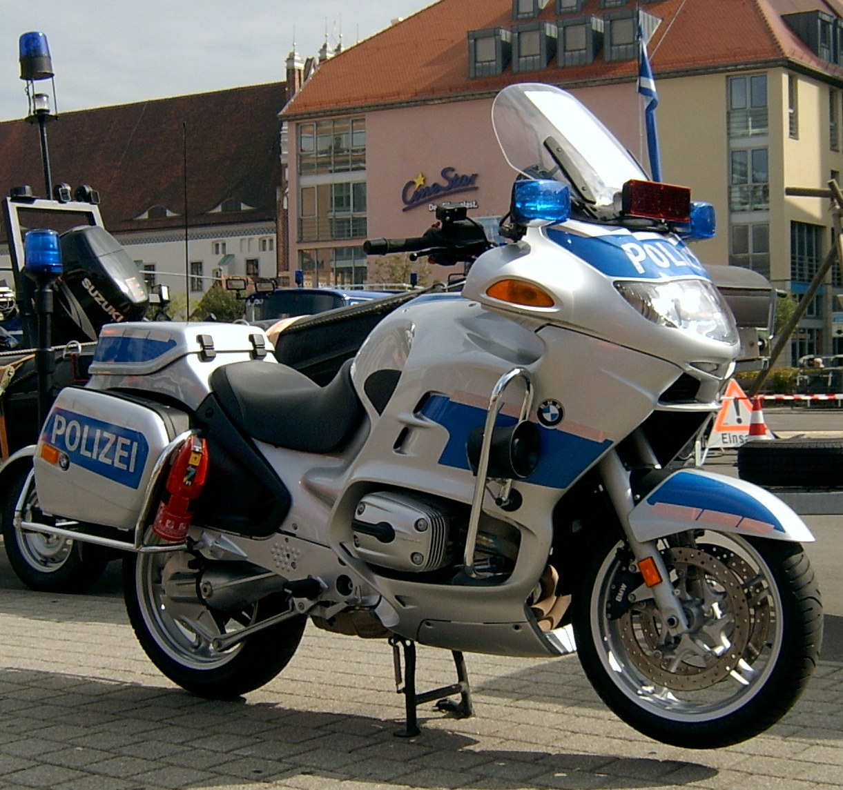 Fahrzeug der deutschen Polizei. Präsentiert in Frankfurt (Oder) am Rande des Oderturmlaufes 2006